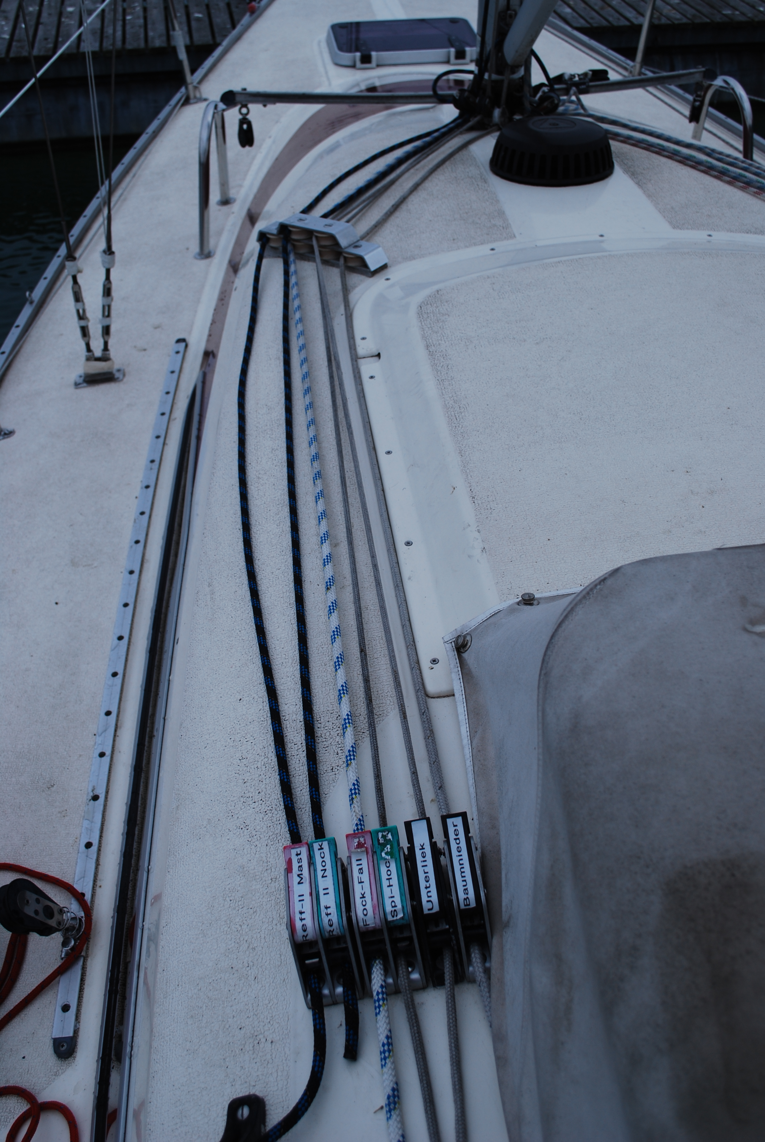 Auf einen Fallenstopper-Block umgeleitete Fallen und Strecker auf einer kleinen Segelyacht.